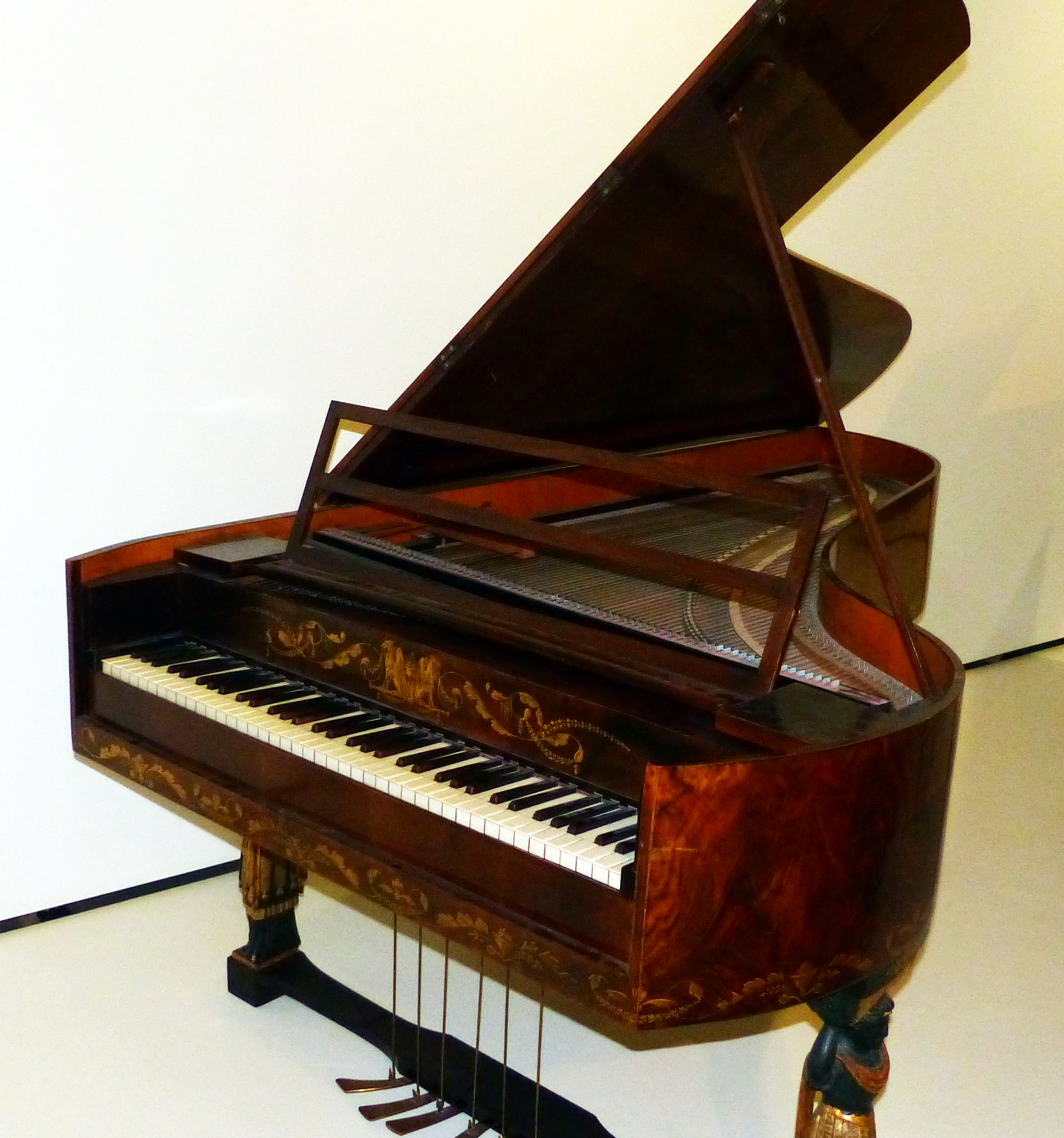 Hammerflügel mit Janitscharenzug, Exponat im Haus der Musik (Fruchtkasten), Landesmuseum Württemberg, Stuttgart